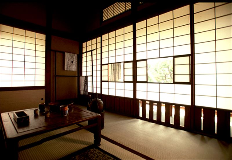 神奈川県茅ケ崎市の茅ケ崎館。小津監督が仕事場にしていた二番の部屋